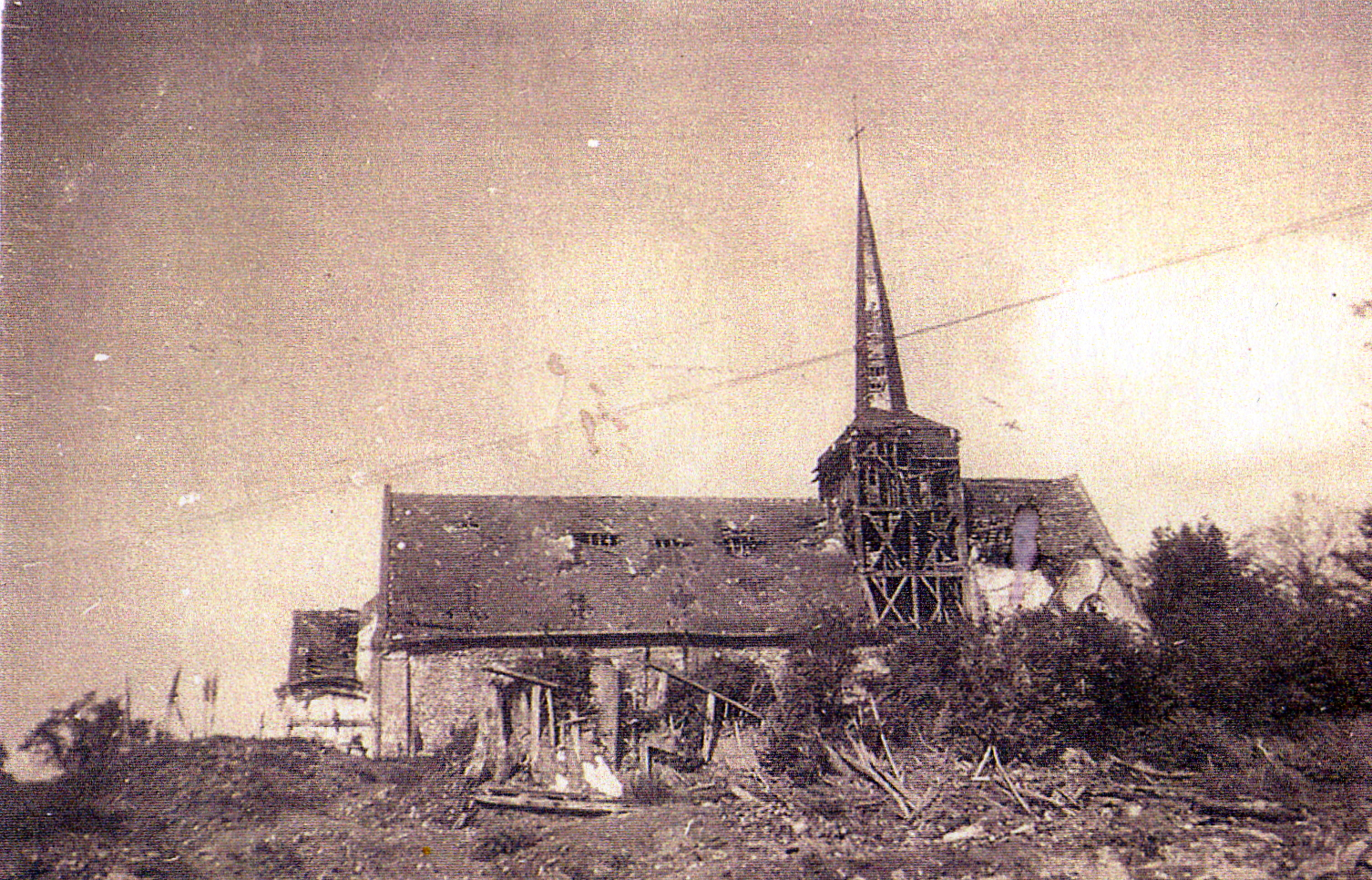 Maisnières (Somme, France) Eglise de Mainières après la chute du V1 en 1944.